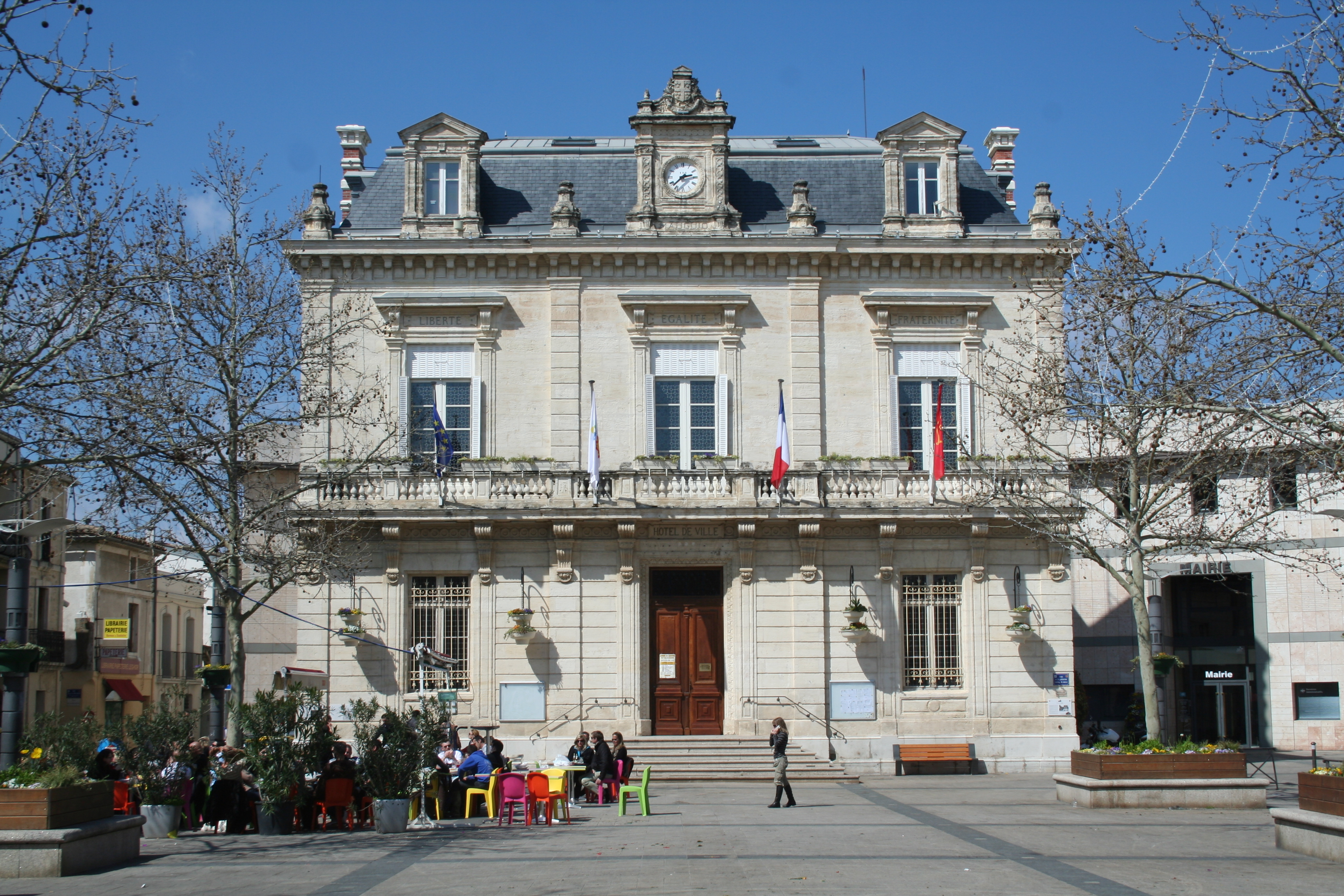 Mauguio (Hérault) - mairie et place